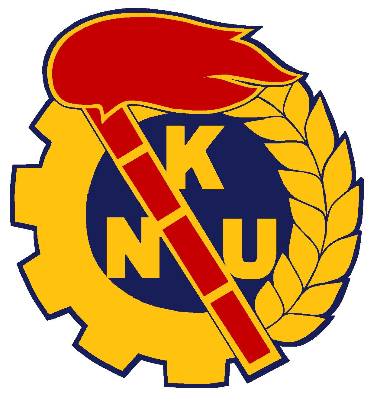 Norges Kommunistiske Ungdomsforbund (NKU) sin logo